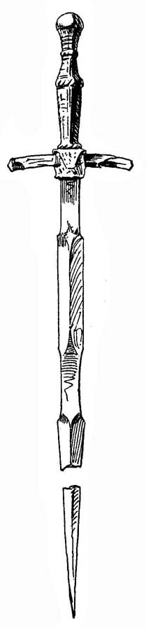 Bohrschwert / Porschwert / perswerte / pratspiesse